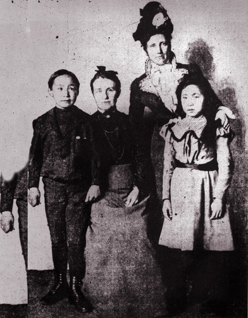 Minik with the Wallace family, 1900